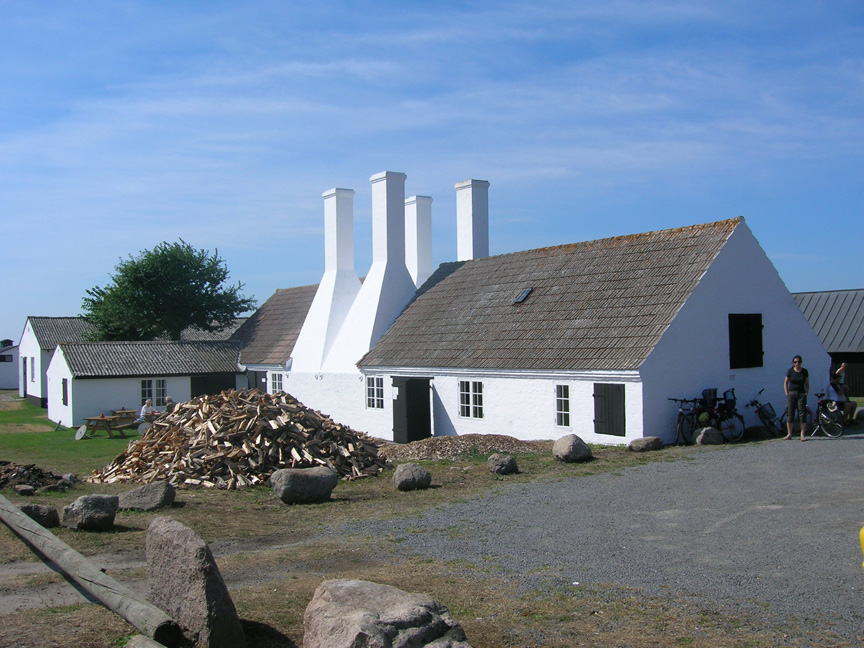 Rogeri - wędzarnia ryb w Hasle, Bornholm.